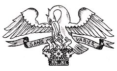 Wappen-Helmzier (Crest) der Grafen von Mensdorff-Pouilly